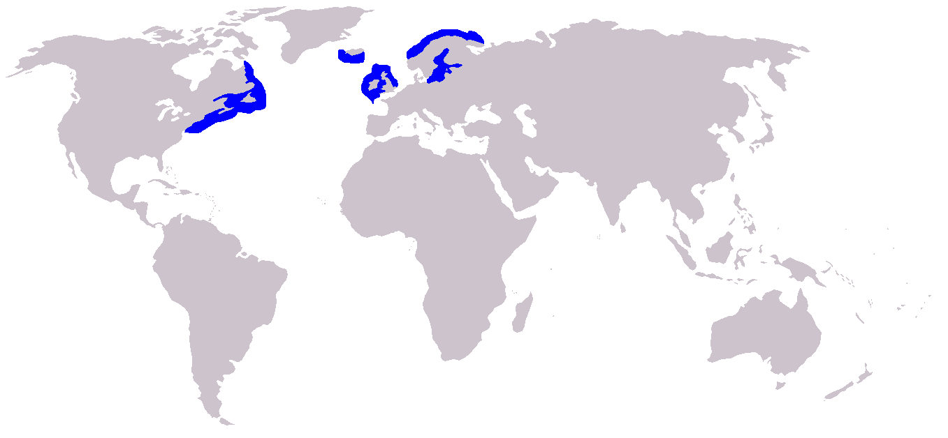 Tiriad ar reunig gris.